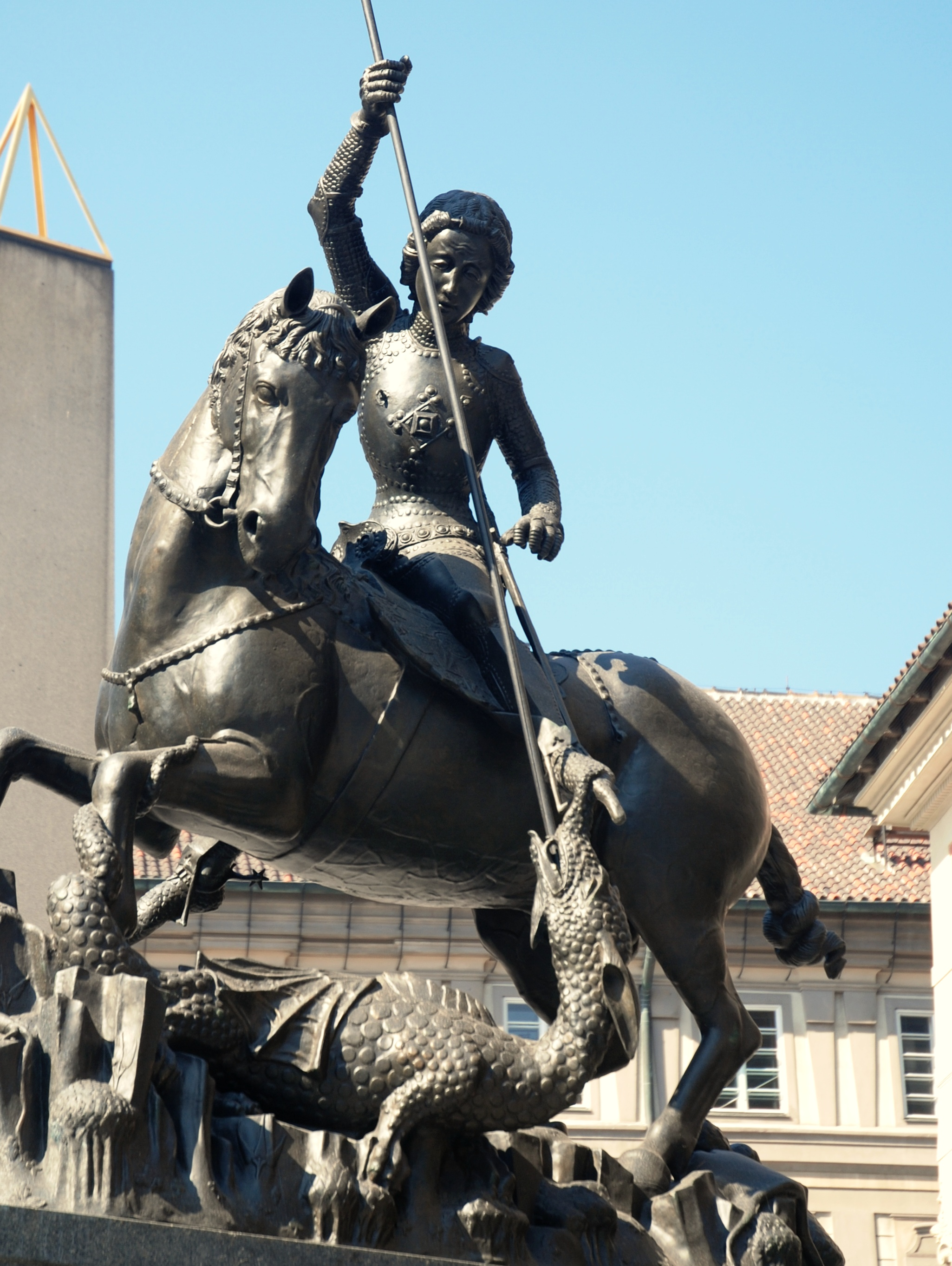 Socha sv. Jiřího na nádvoří Pražského hradu